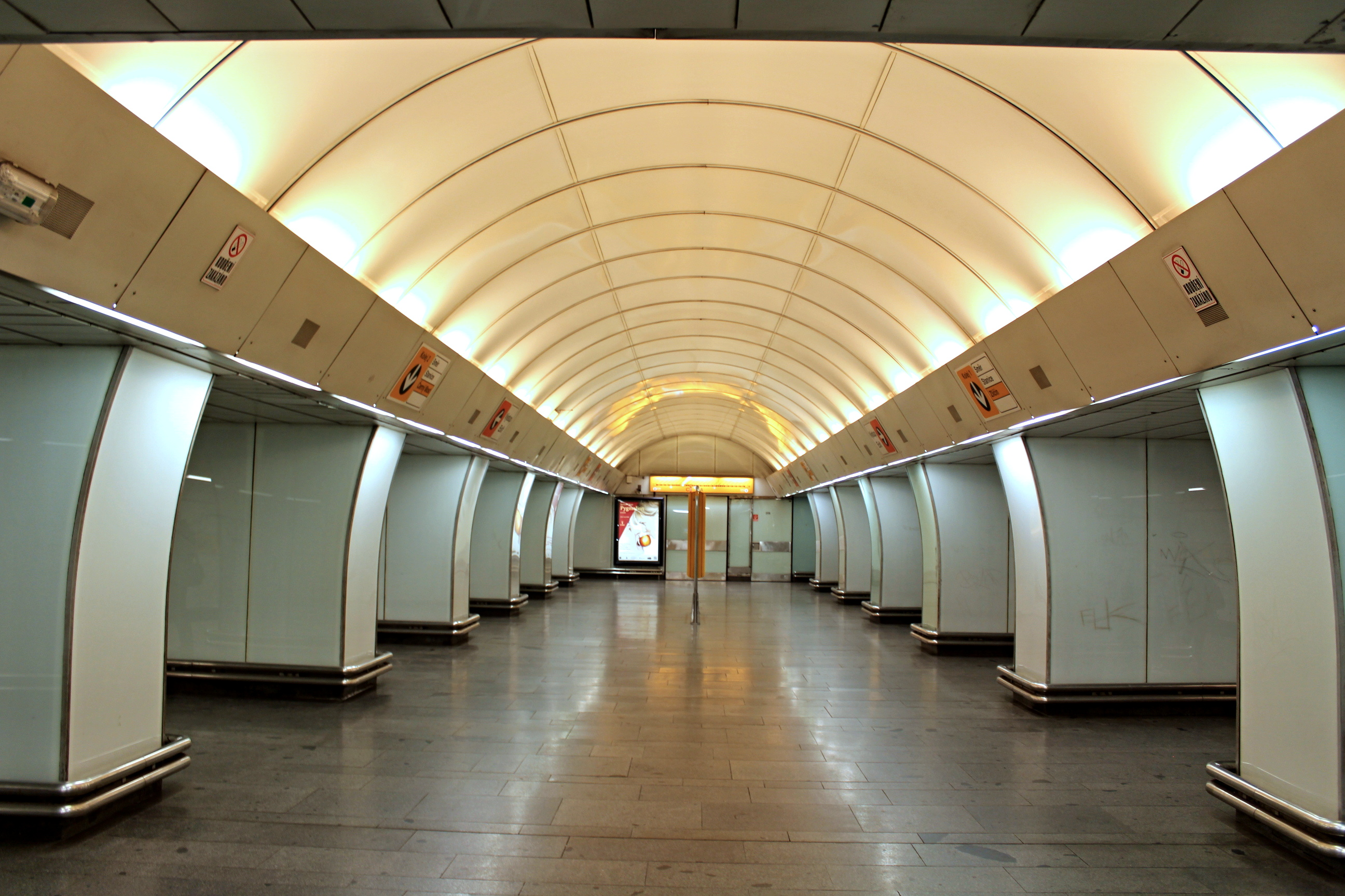 Praha Invalidovna metro